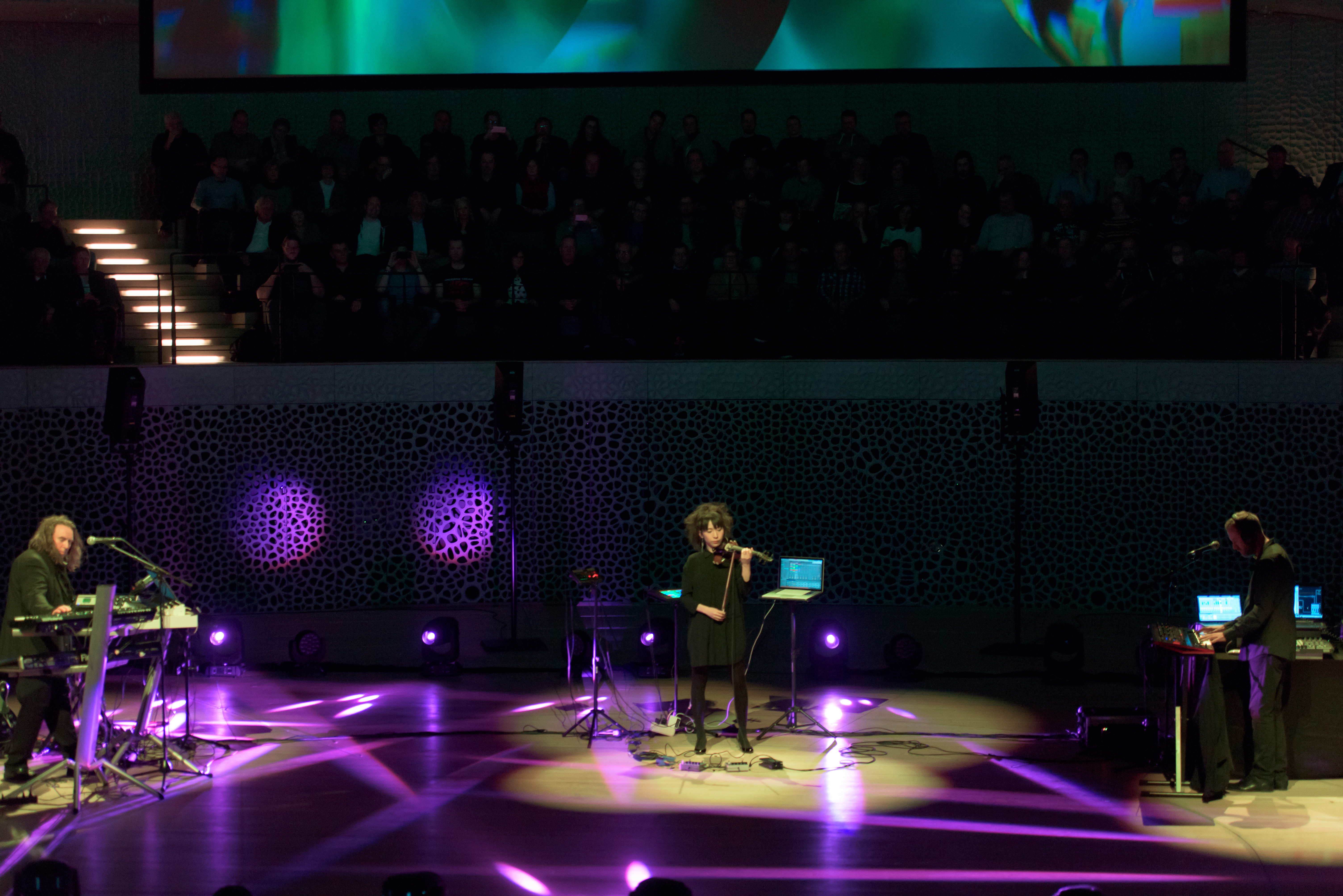 Tangerine Dream bei der Quantum of Electronic Evolution Tour in der Elbphilharmonie Hamburg 2018